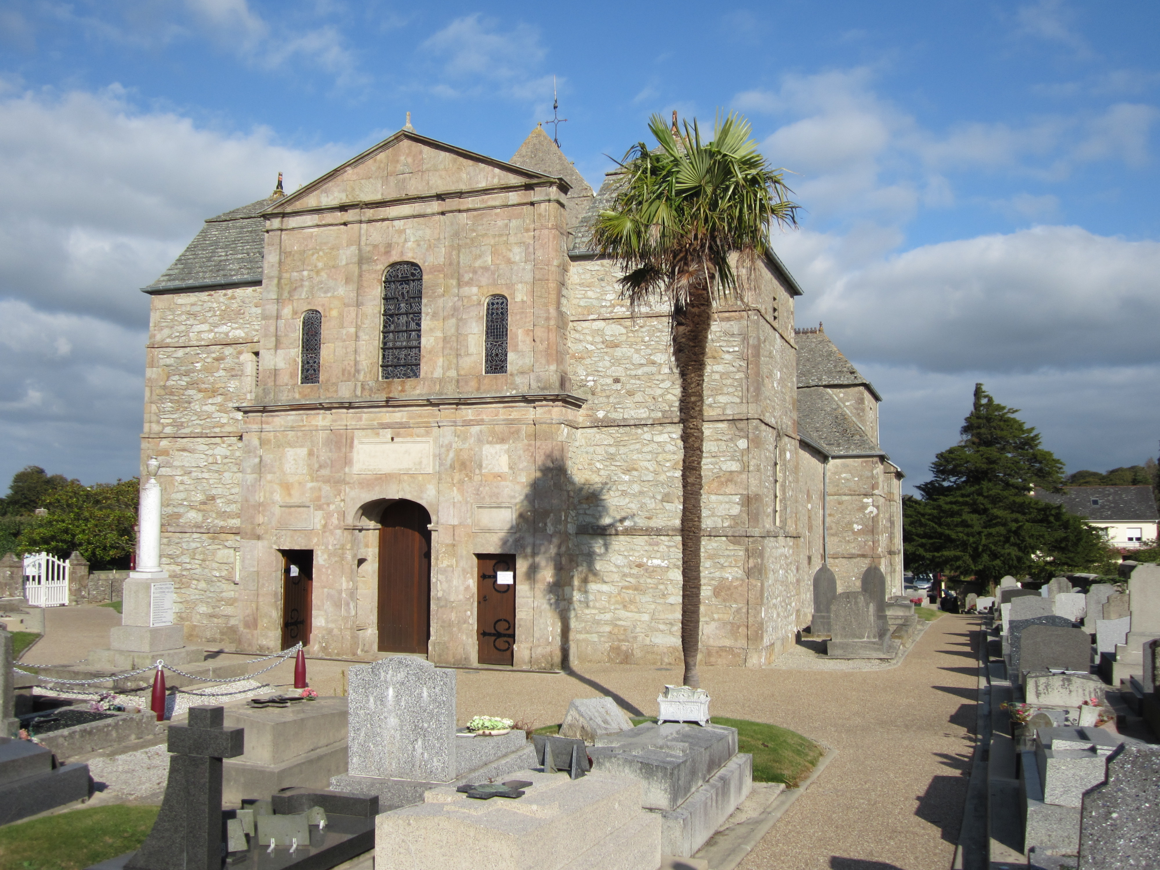 Église Notre-Dame de Digosville